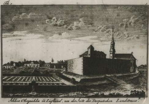 Põltsamaa loss ja kirik. Vasakul Uue-Põltsamaa mõisasüda. Pilt Johann Christoph Petri raamatust "Neuestes Gemälde von Lief- und Ehstland..." (1809).